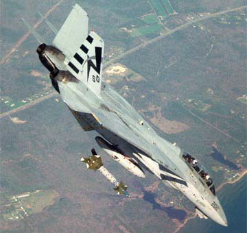 F-14 Tomcat wirft eine lasergelenkte Bombe ab